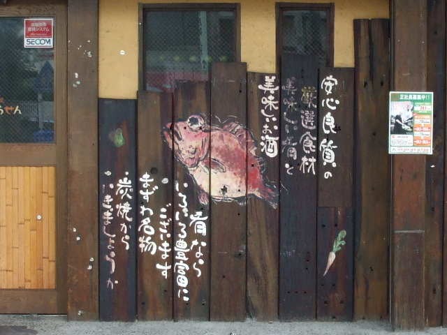 JR鶴見駅近くの木製枕木を再利用している、居酒屋。